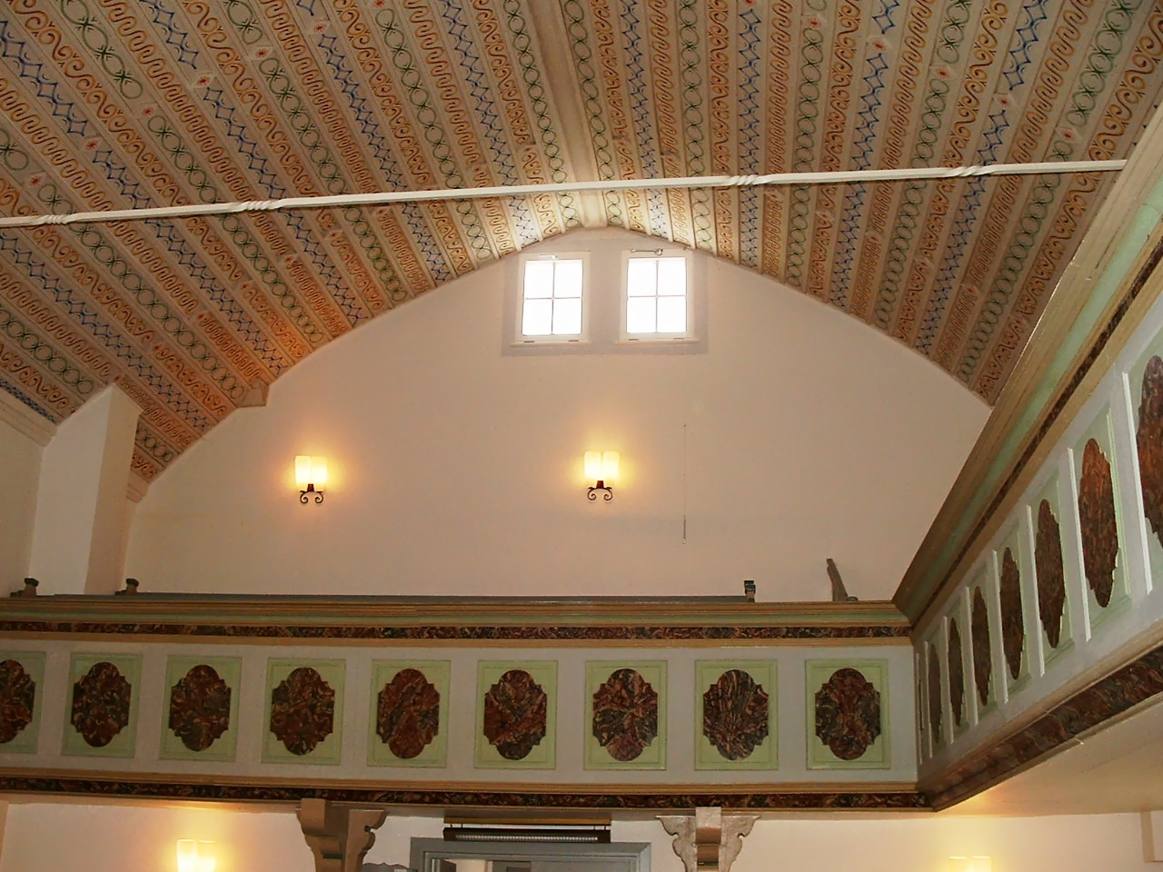 Evangelische Kirche (Sulzbach Hunsrück)